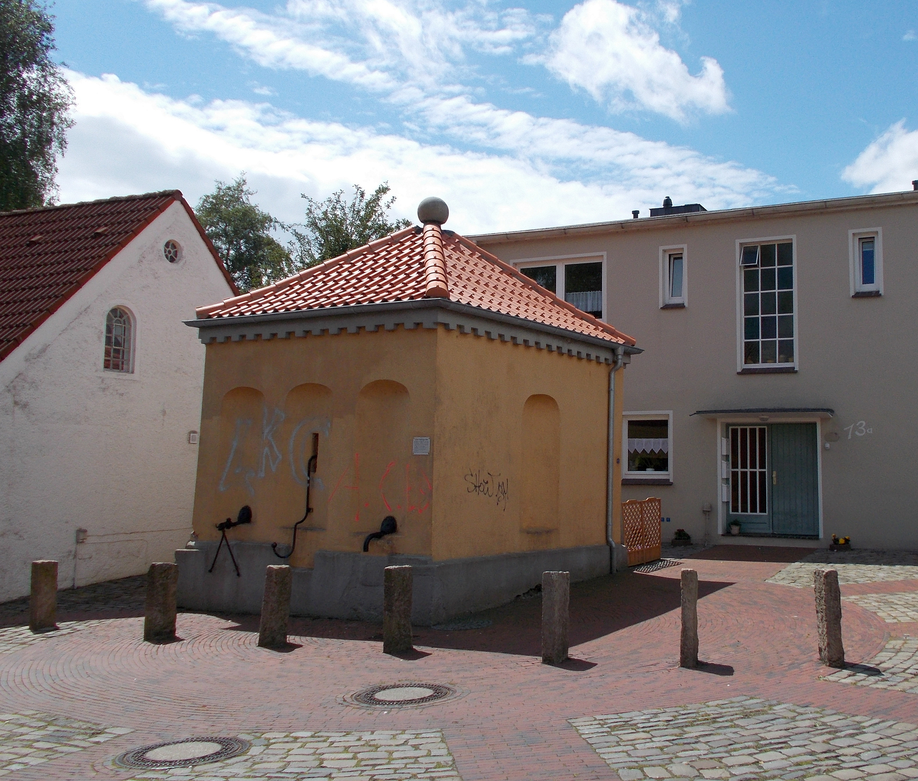 Denkmalgeschützte Brunnenhaus. Die Kampütte geht zurück auf den herrschaftlichen Brunnen aus dem Jahre 1577 der das Schloss. Das als "Wasserkunst" bezeichnete Bauwerk wurde 1816 zurückgebaut und nahm die heutige Form an.